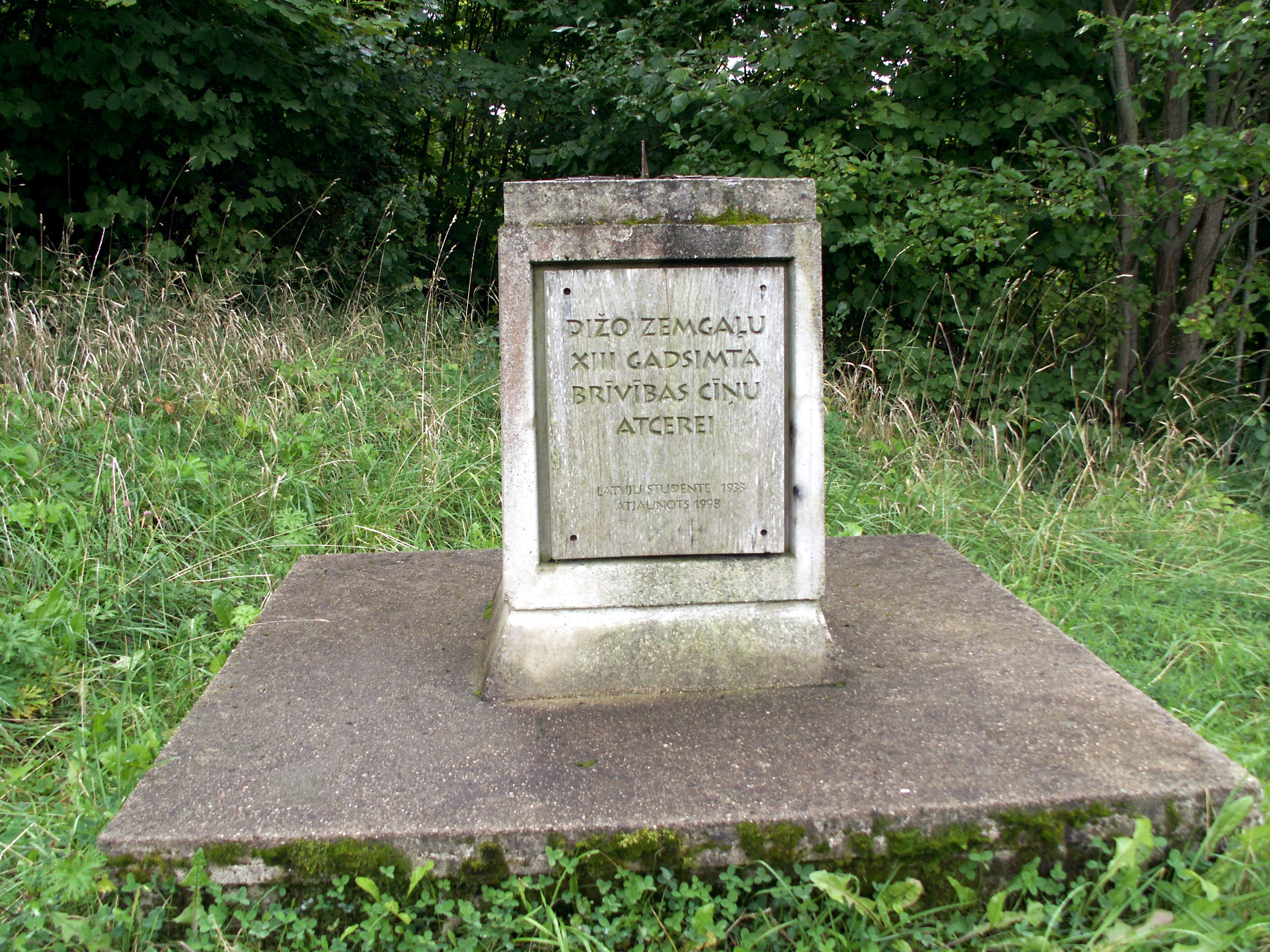 Paminklas didžiajai žiemgalių XIII a. laisvės kovai atminti tarp Šventkalnio ir Tervetės piliakalnio, Tervetė, Tervetės pagastas, Latvija